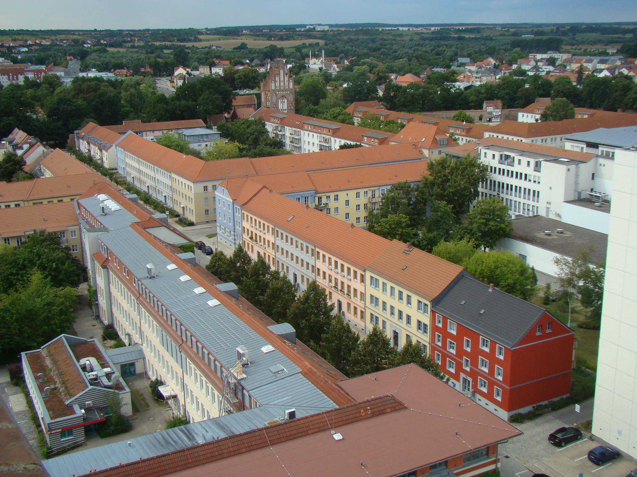 Blick auf Neubrandenburg vom Turm der Konzertkirche